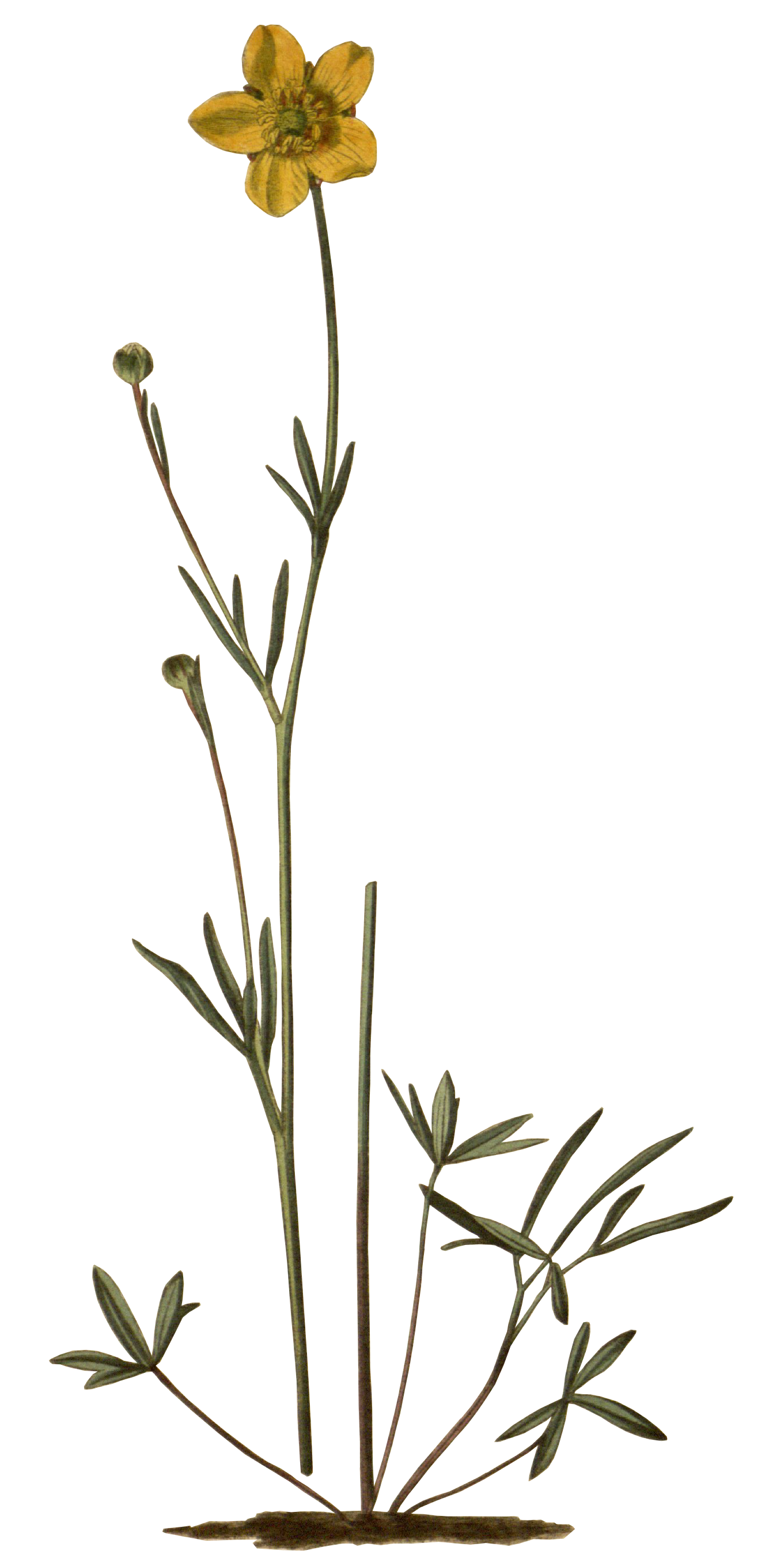 Ranunculus pedatus Waldst. et Kit.